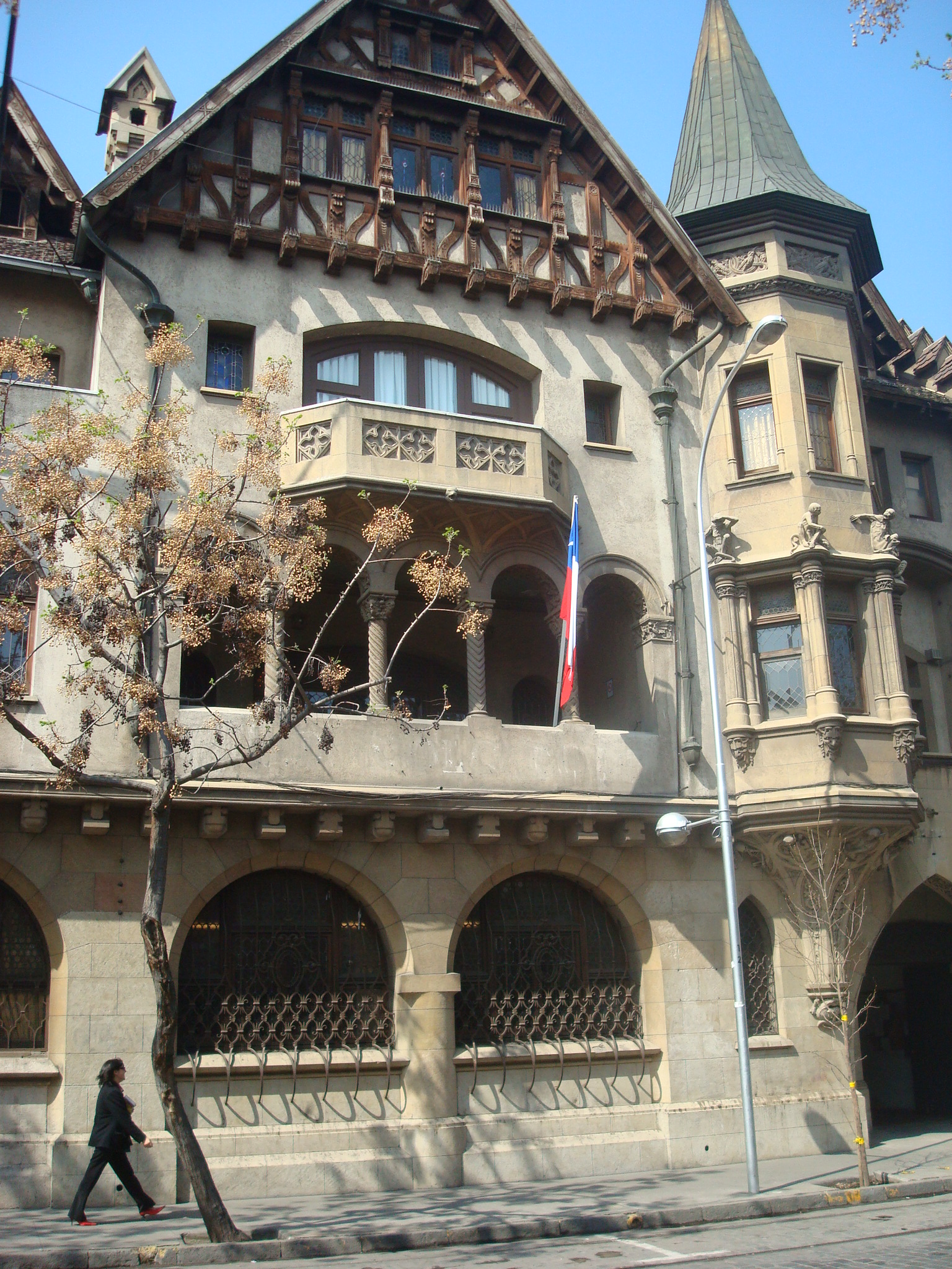 Casona Cienfuegos 41, Santiago, Chile